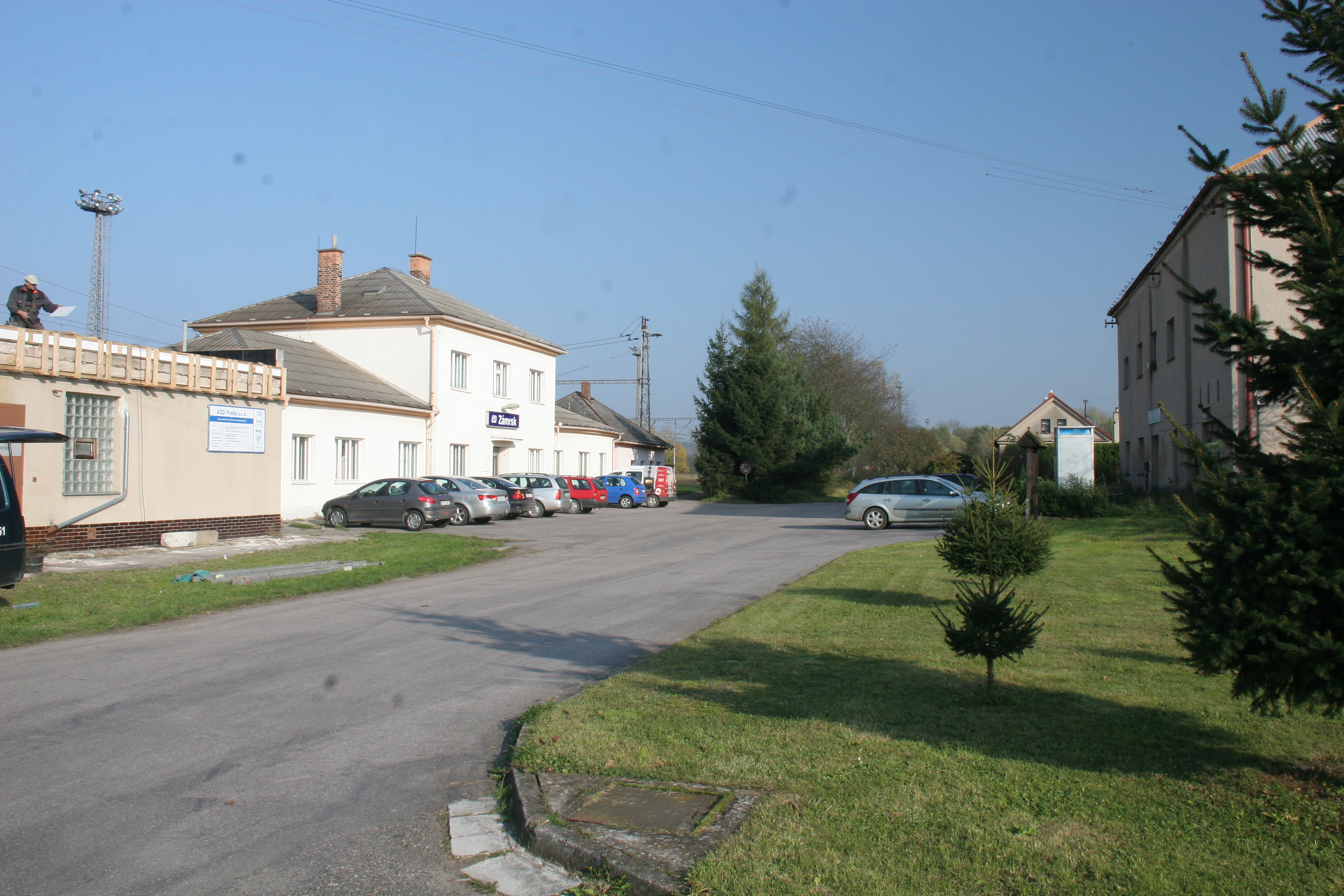 Nádraží Zámrsk